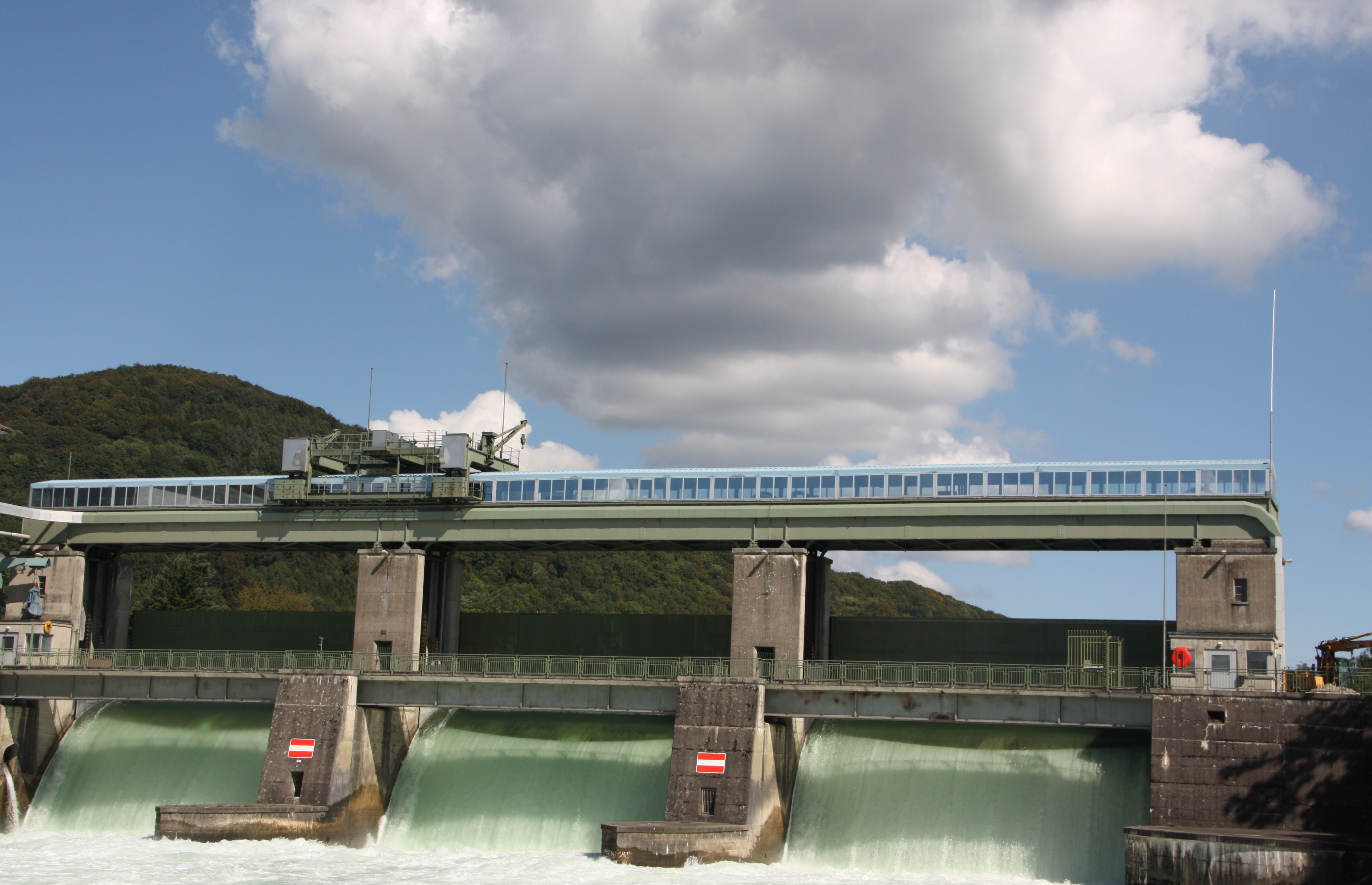 Kraftwerk Reckingen am Hochrhein, in der Grenzlage zwischen der Schweiz (Kanton Aarau) und Deutschland (Landkeis Waldshut) bei der Ortschaft Reckingen, Ortsteil der Gemeinde Küssaberg im Landkreis Waldshut in Baden-Württemberg. Die Schütze des Kraftwerks.